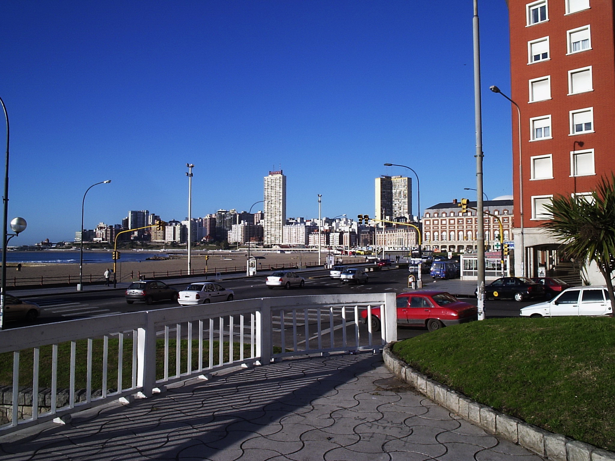 Costanera